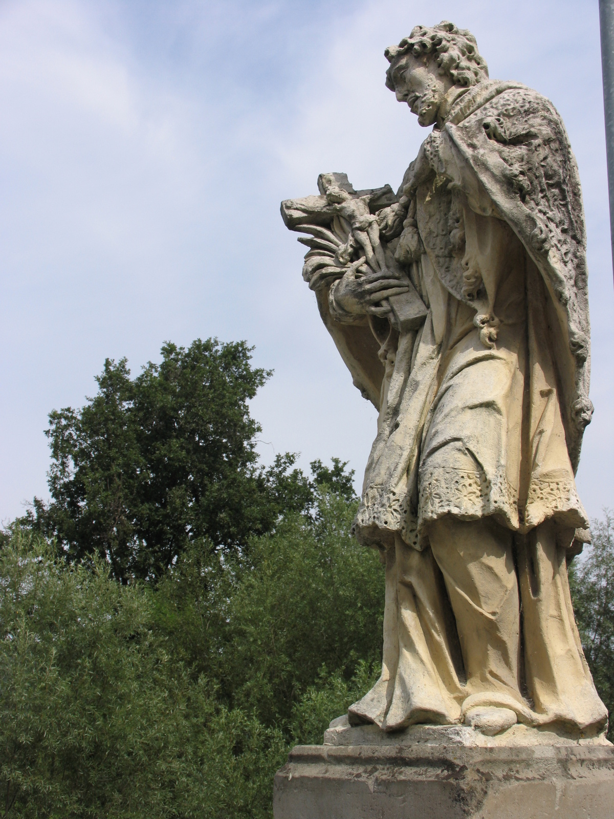 Poznobaročni (2. pol. 18. stol.) kip sv. Janeza Nepomuka v kraju Breg pri Majšperku. Stoji na sredi mostu čez Dravinjo. Napravljen je iz peščenjaka.